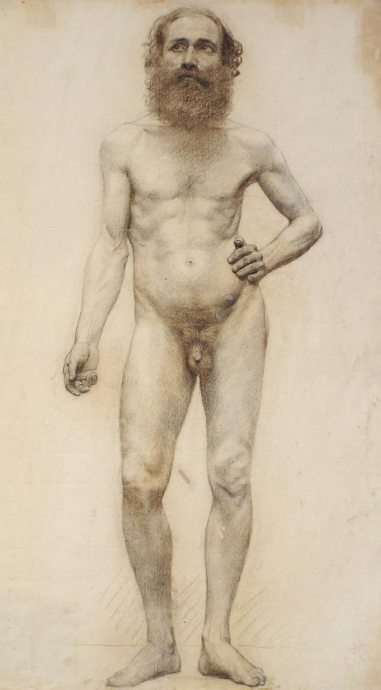 PEDRO WEINGARTNER, estudo, carvão s/ papel, 62 x 43 cm. Acervo da Pinacoteca Barão de Santo Ângelo, Instituto de Artes da UFRGS, Porto Alegre, Brasil.